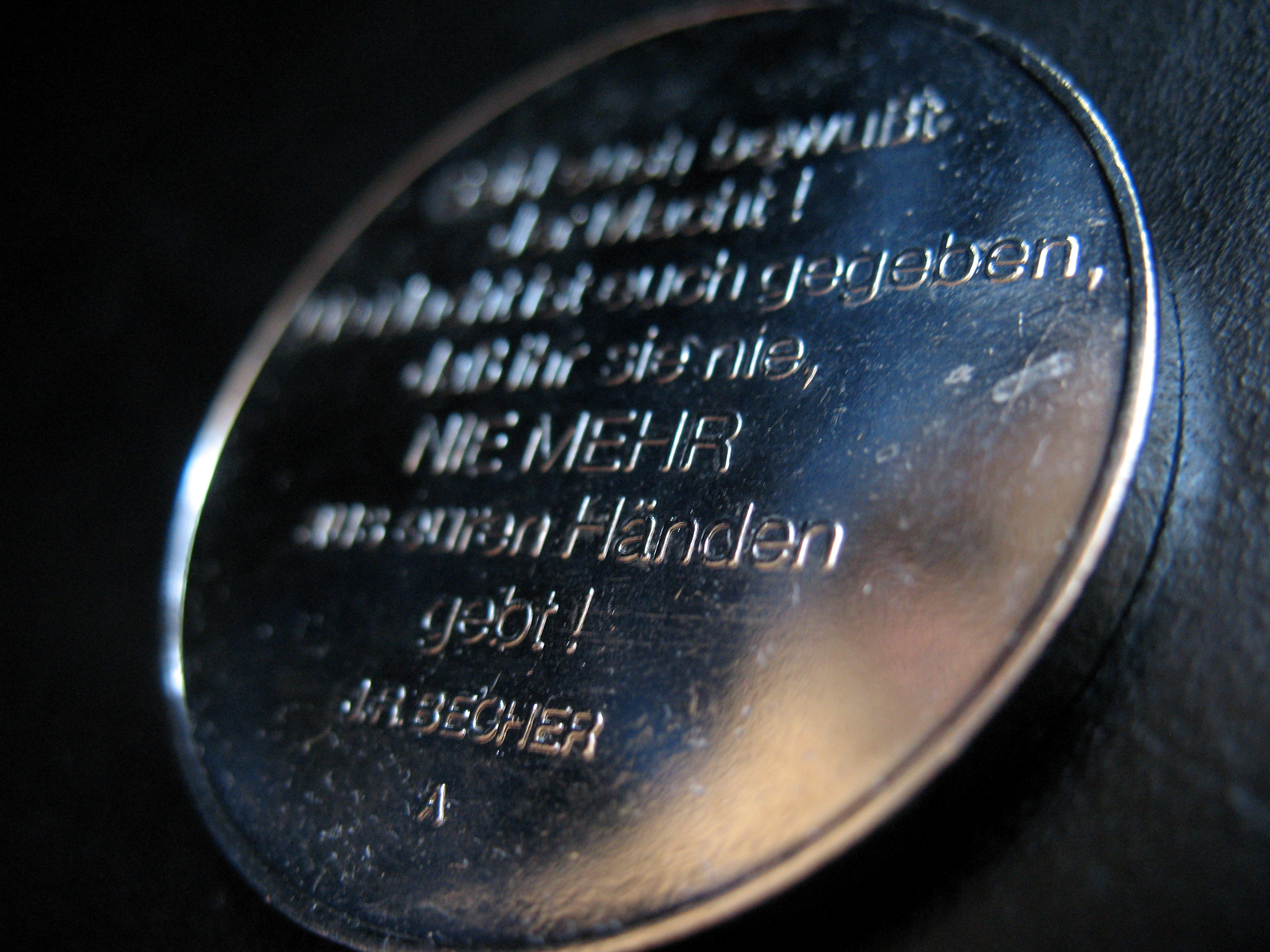 Zum 30 Jahrestag der NVA wurde eine Ehrenmedaillie geschaffen. Auf der Frontseite ist die Zeremonie - „Übergabe der die Truppenfahne“- zu sehen. Der Textumlauf, 1956 – 1986 – 30 Jahre NVA – Dem 1 Regiment, kreist die Abbildung ein. Auf der Rückseite ist folgendes Zitat von J.R. Becher eingeprägt: „Seid euch bewußt der Mach! Die Macht ist euch gegeben, daß ihr sie nie, NIE MEHR aus euren Händen gebt!